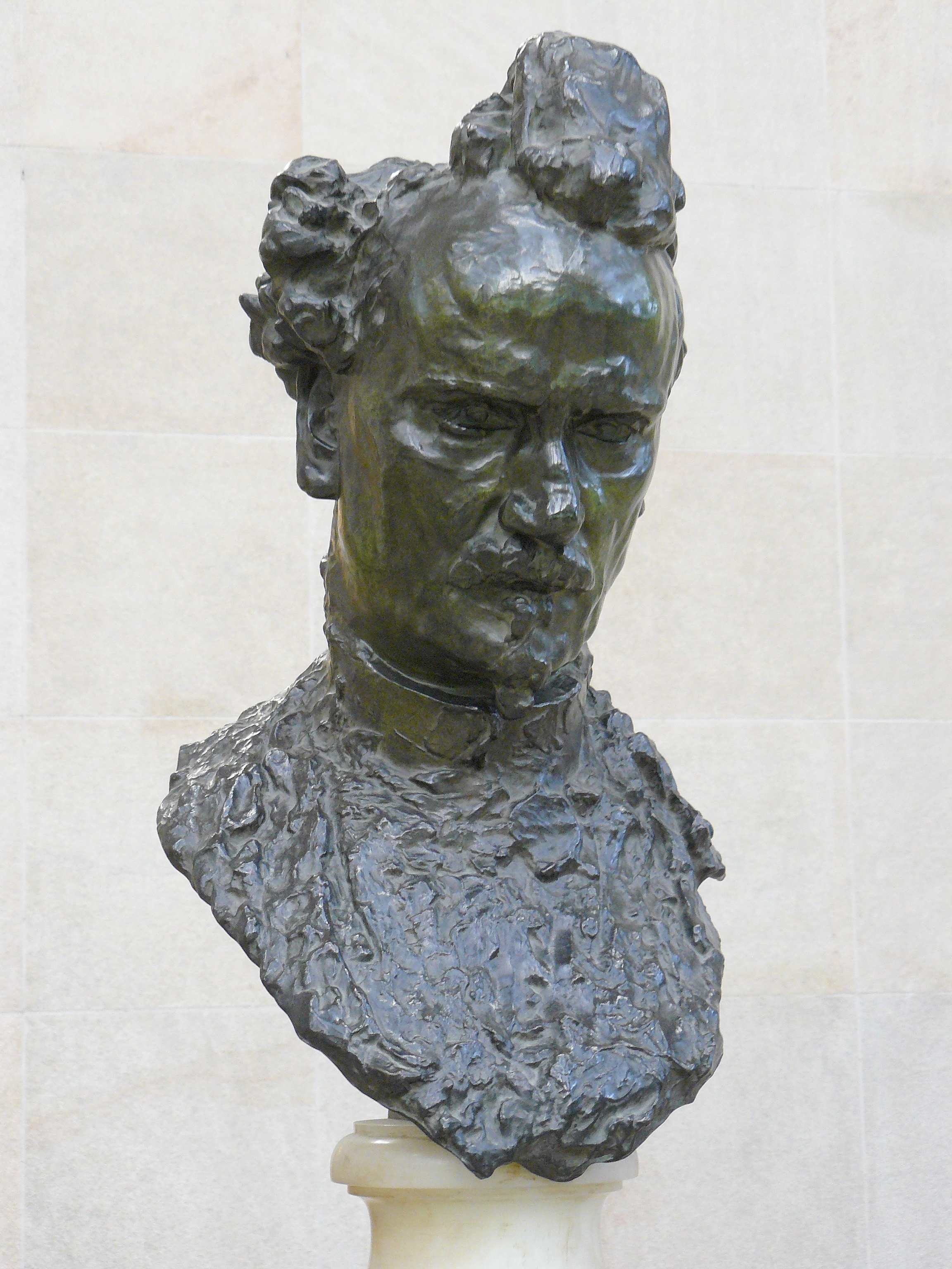 Henri Rochefort, buste par Auguste Rodin, bronze vers 1890, hauteur environ 50 cm - Fonte par Alexis Rudier, agrandissement du buste de 1884 - acquis en 1906, Musée d'Orsay n° Inv RF 4067